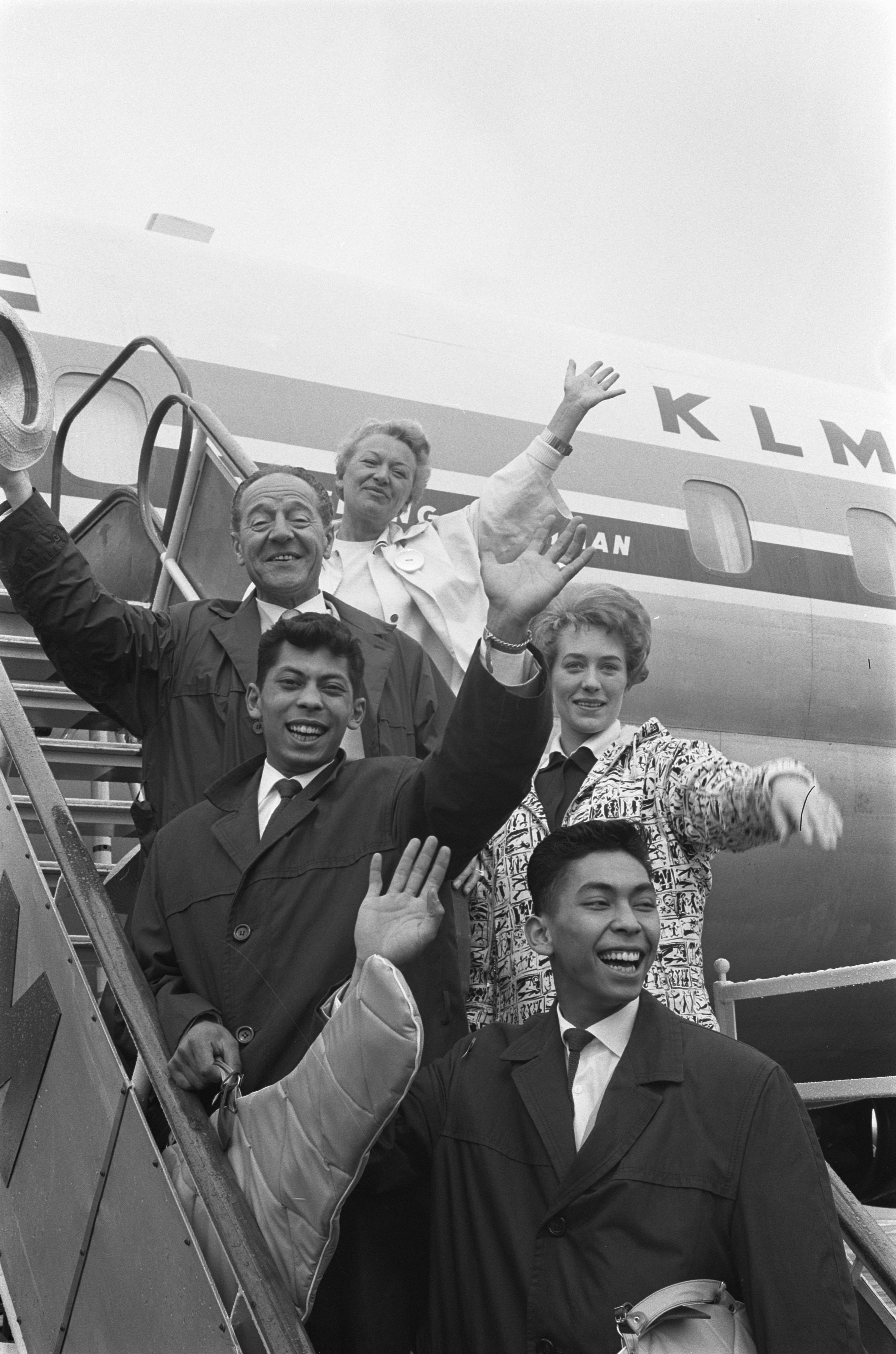 Collectie / Archief : Fotocollectie Anefo Reportage / Serie : [ onbekend ] Beschrijving : Naar Nieuw-Guinea vertrokken. onder naar boven Blue Diamonds , Anita Berry , Willy Vervoort en Tonny Boucher Datum : 22 augustus 1962 Locatie : Noord-Holland, Schiphol Trefwoorden : muziek, vliegtuigen, vliegvelden, zangeressen, zangers Persoonsnaam : Boucher, Tonny, Vervoort, Willy Instellingsnaam : Blue Diamonds Fotograaf : Pot, Harry / Anefo Auteursrechthebbende : Nationaal Archief Materiaalsoort : Negatief (zwart/wit) Nummer archiefinventaris : bekijk toegang 2.24.01.05 Bestanddeelnummer : 914-2293